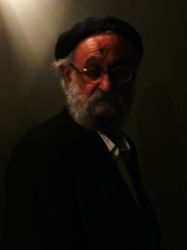 yade ejrahaye ishon ba ostad Faramarze Payvar bekheir...